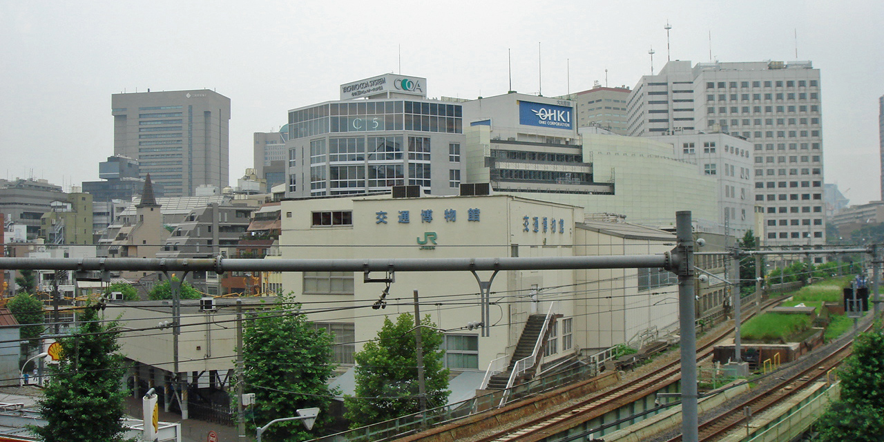 『肉の万世』から望む閉館後の交通博物館と旧万世橋駅ホーム